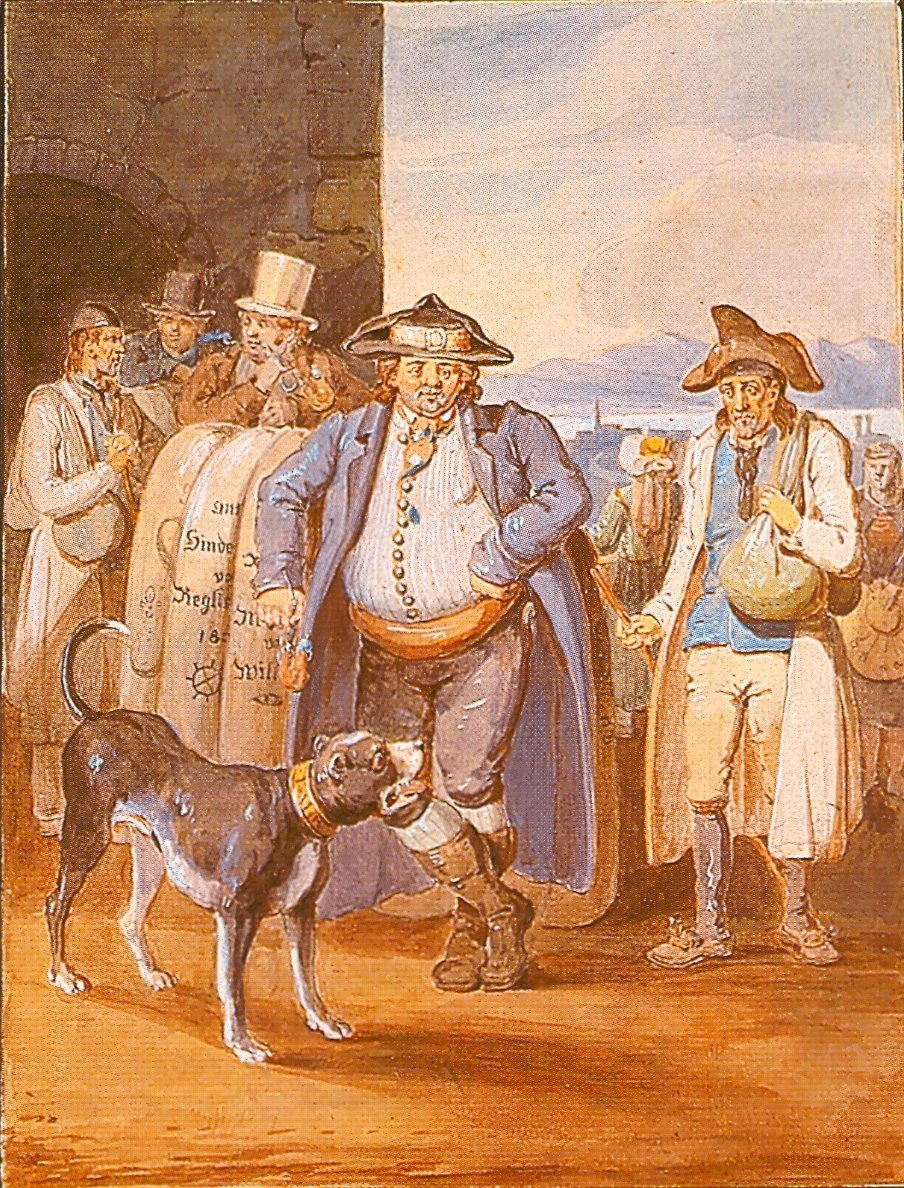 Neuwürttembergischer Falllehen Bauer - Altwürttembergischer Grundbesitzer Falllehen: fällt bei jedem Todesfall des Inhabers wieder an die Herrschaft zurück, wenn dieser das Lehen nicht wieder an den Erben zurückgibt. Das Gut bleibt erhalten. Realteilung: Das Erbe wird unter allen direkten Nachkommen gleichmäßig verteilt. Das Gut wird zersplittert, Streubesitz Aquarell Stuttgart, Staatsgallerie, Graphische Sammlung, Inv.Nr. 4287